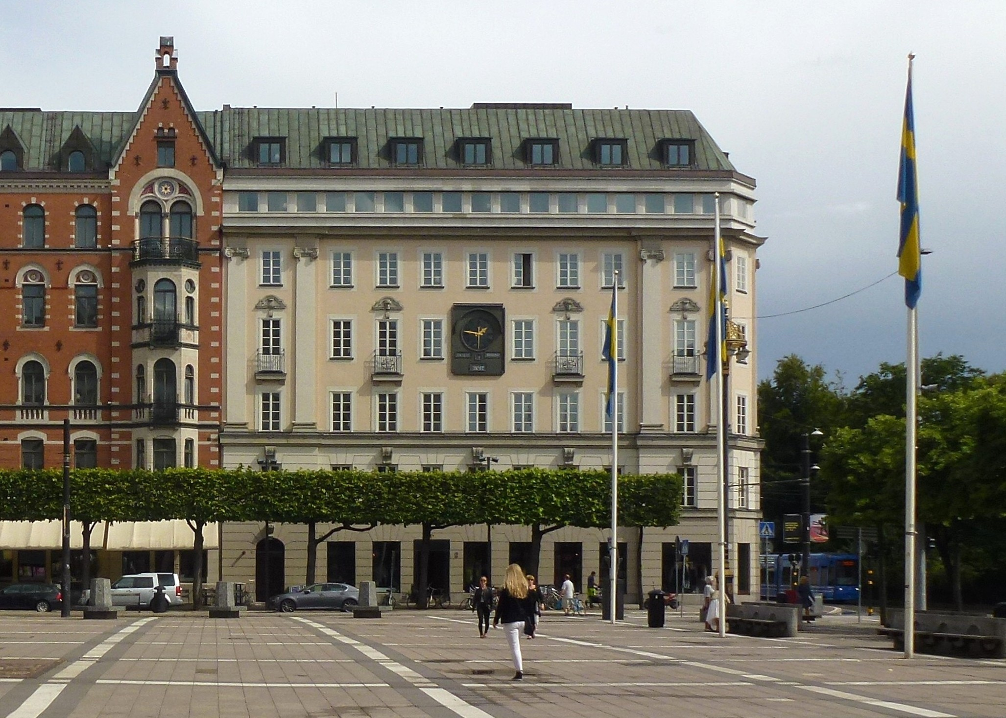 Kreditbankens före detta hus vid Norrmalmstorg